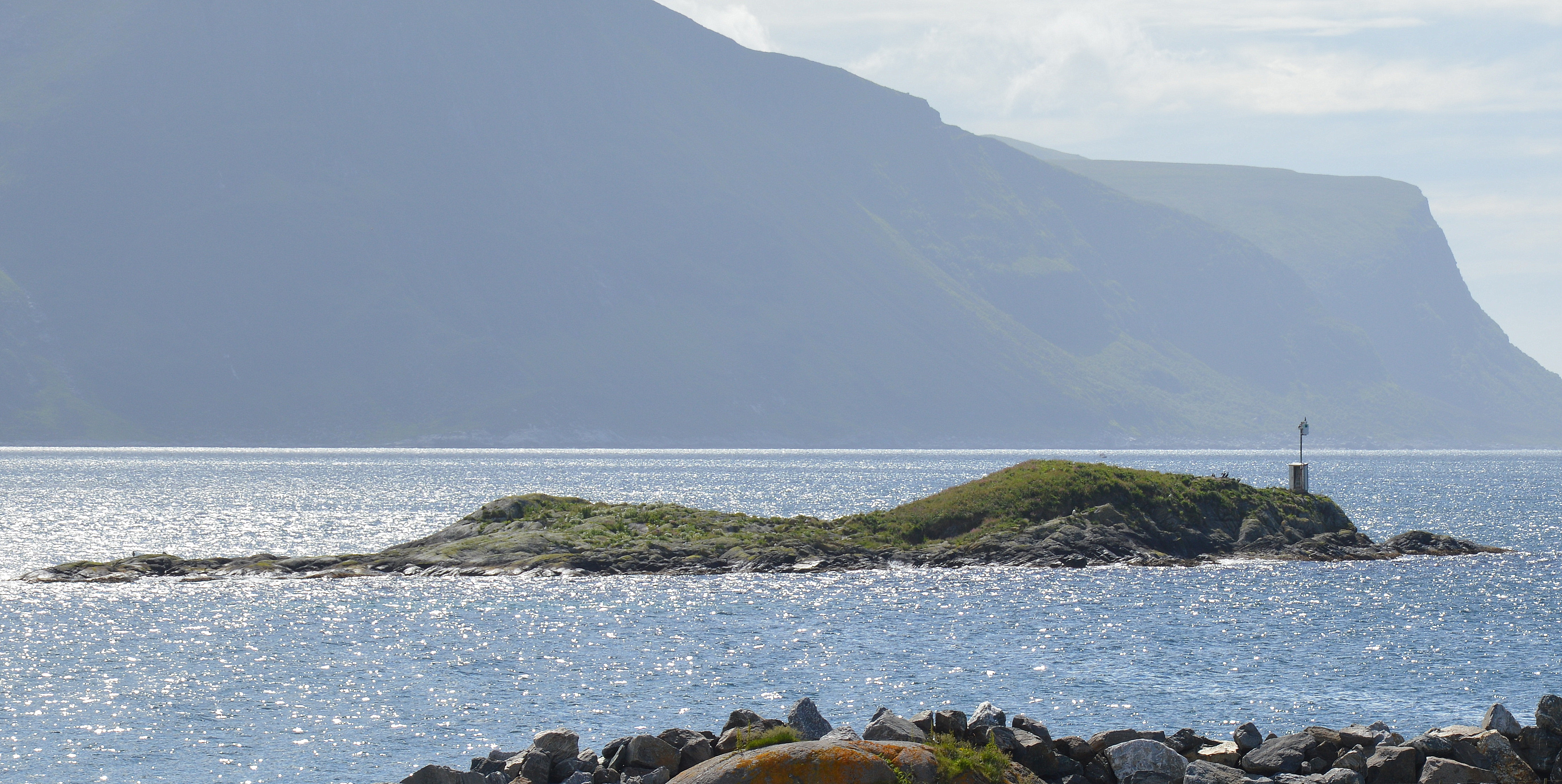 Snegleværholmen bei Alesund